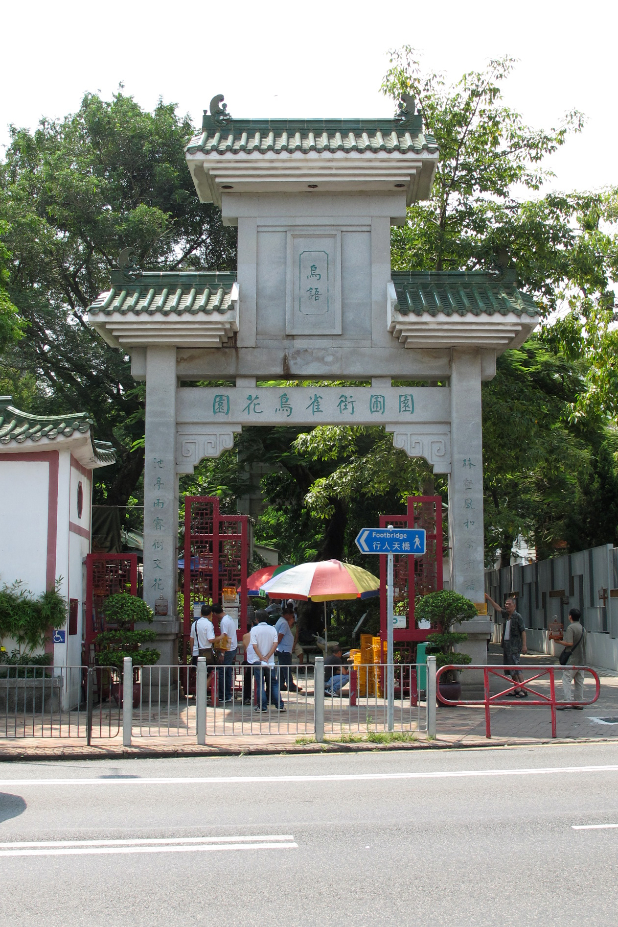 Yuen Po Street Bird Garden Entrance